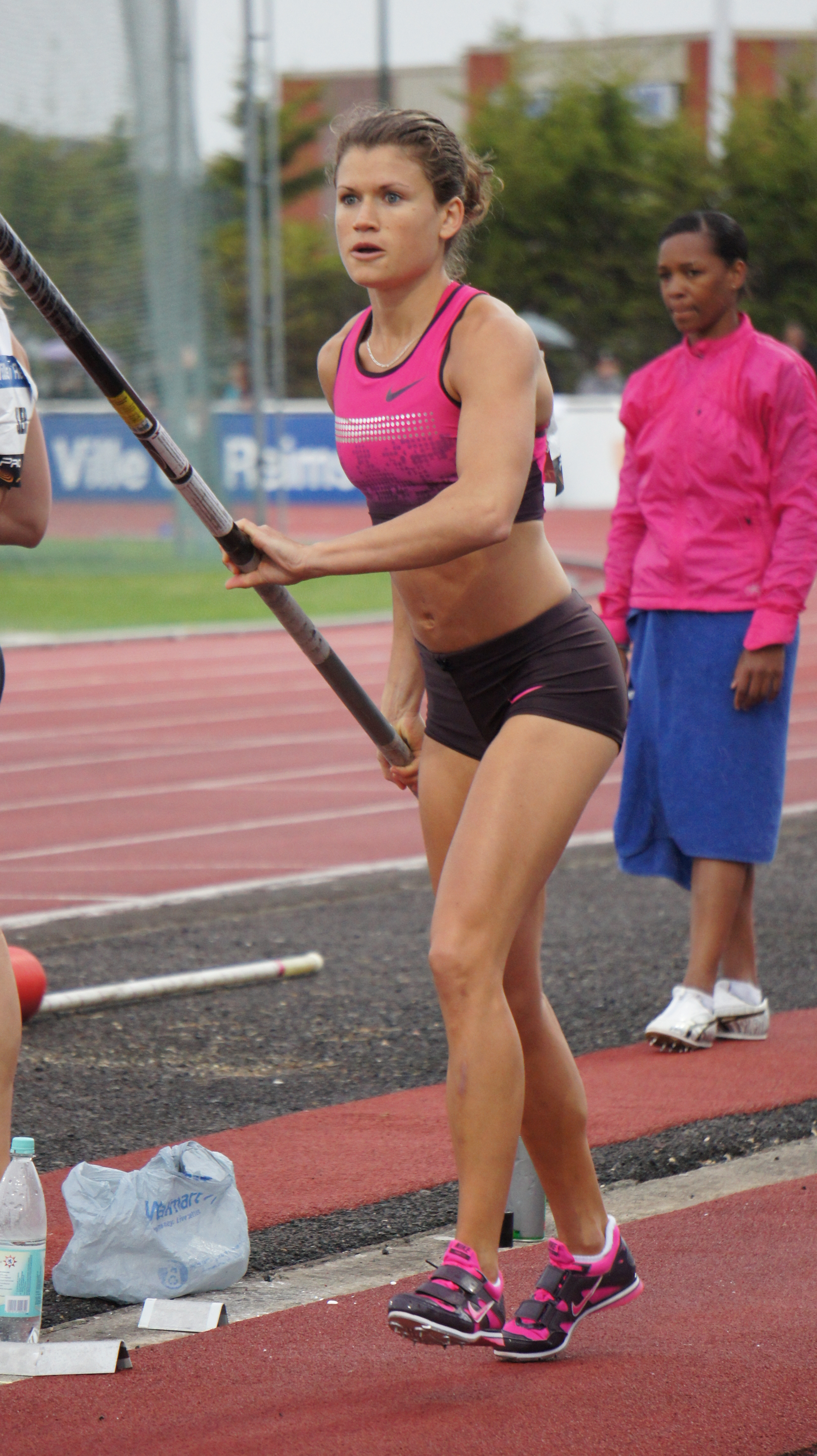 Marion Lotout lors des Rencontres d'athlétisme de Reims 2013, au second plan Maria Ribeiro-Tavares.